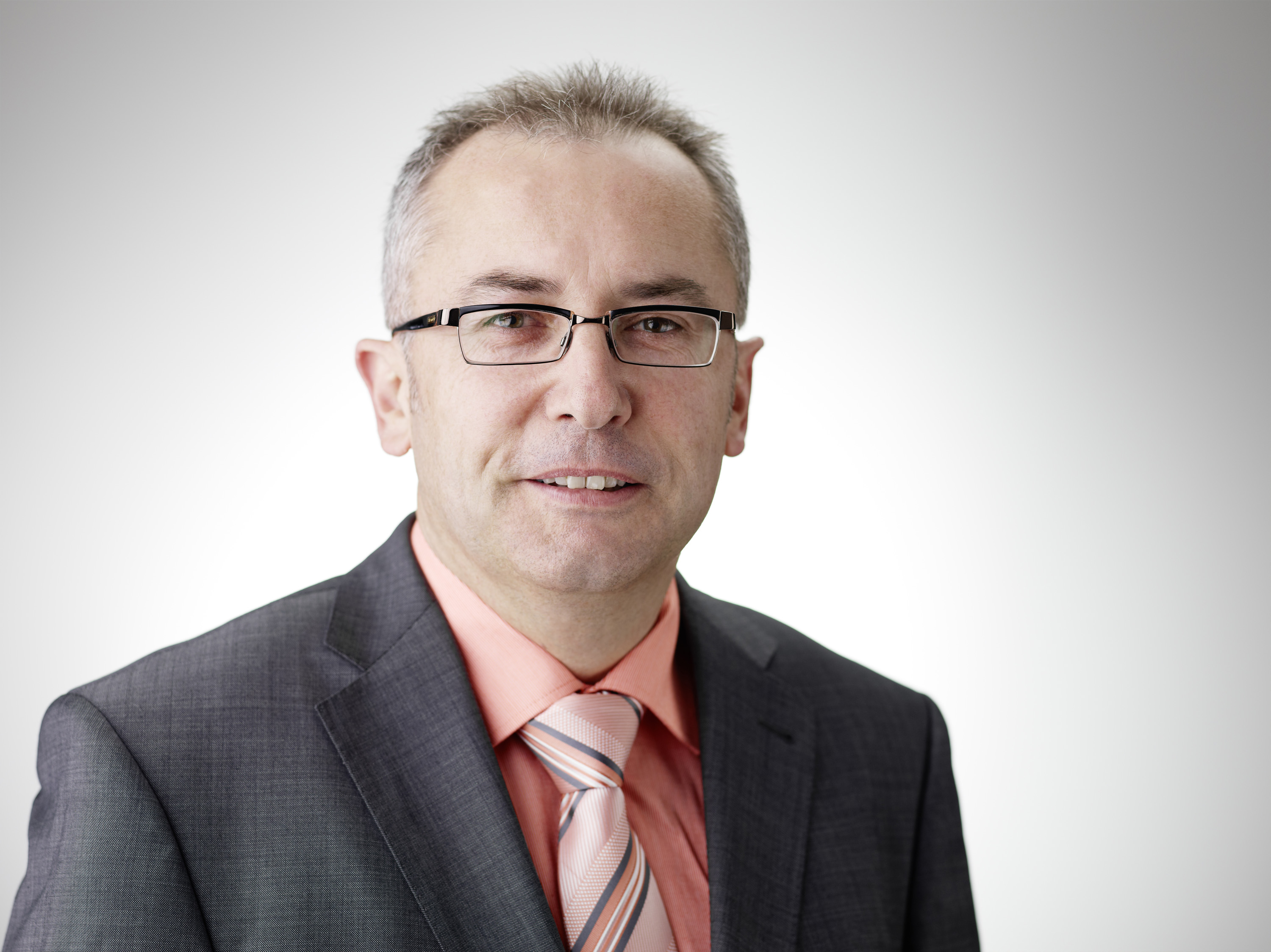 Thomas Ammann kandidiert am 23. Oktober 2011 als Kandidat der CVP für den Nationalrat.